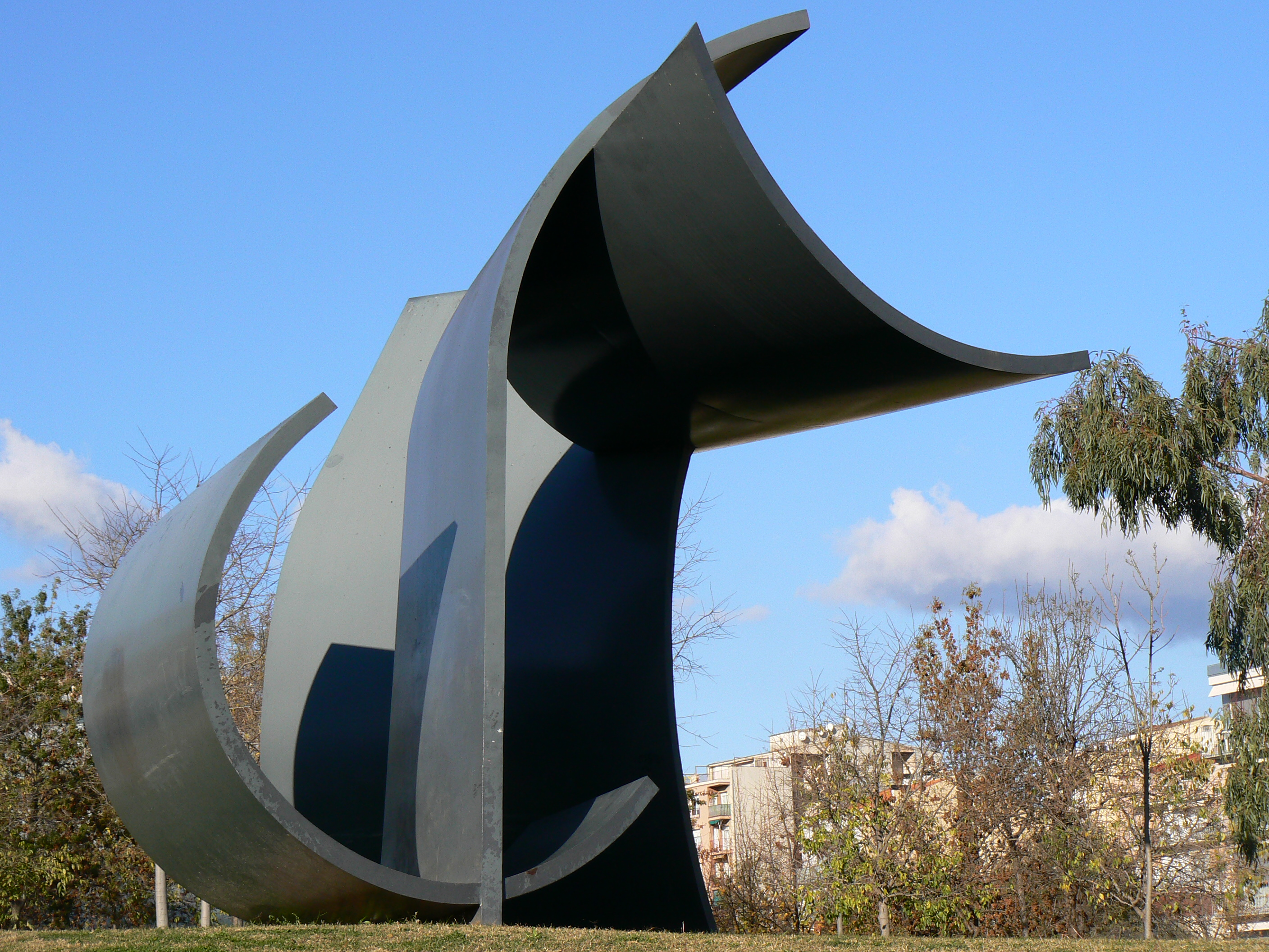 Versió monumental de 1999 de l'escultura creada per Oteiza el 1957. Monumental version of Tribute to Malevich (Oteiza, 1957).